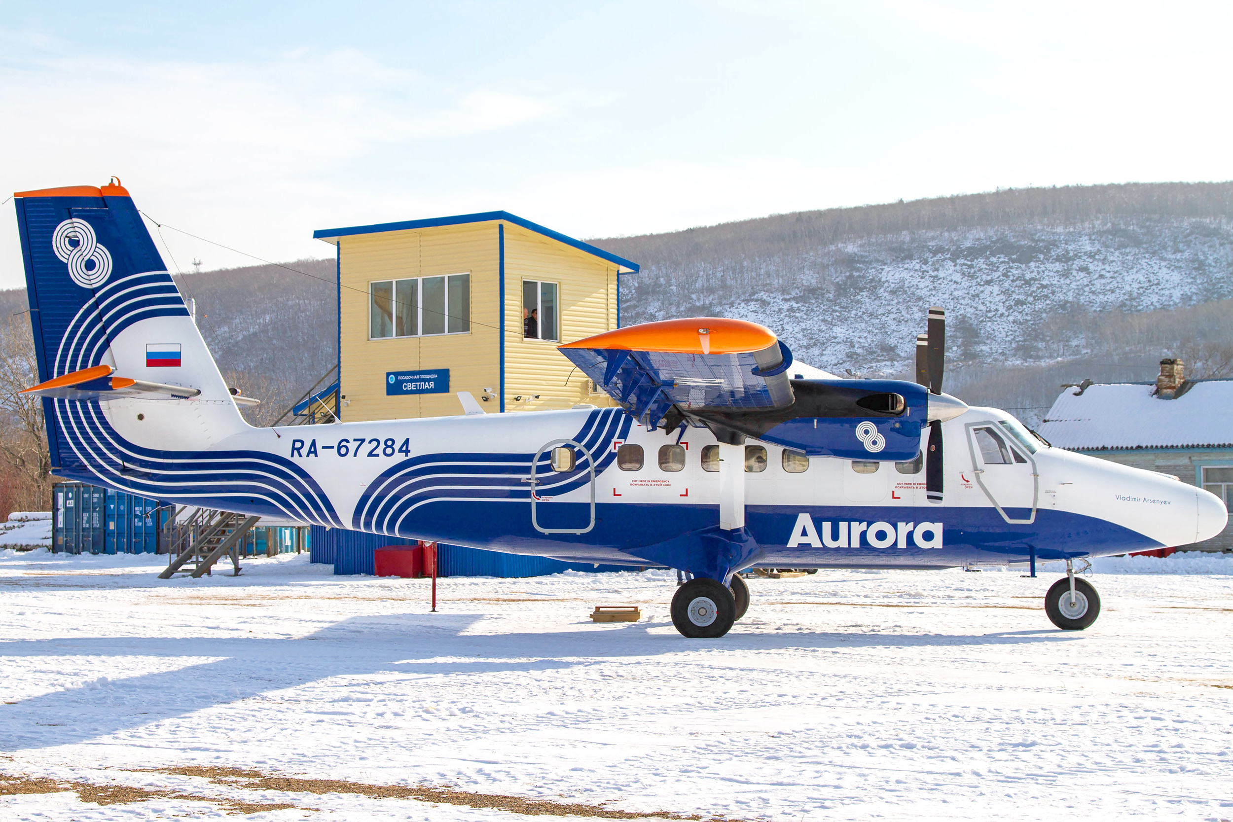 Посадочная площадка в пос. Светлая и самолет DHC-6 авиакомпании "Аврора"